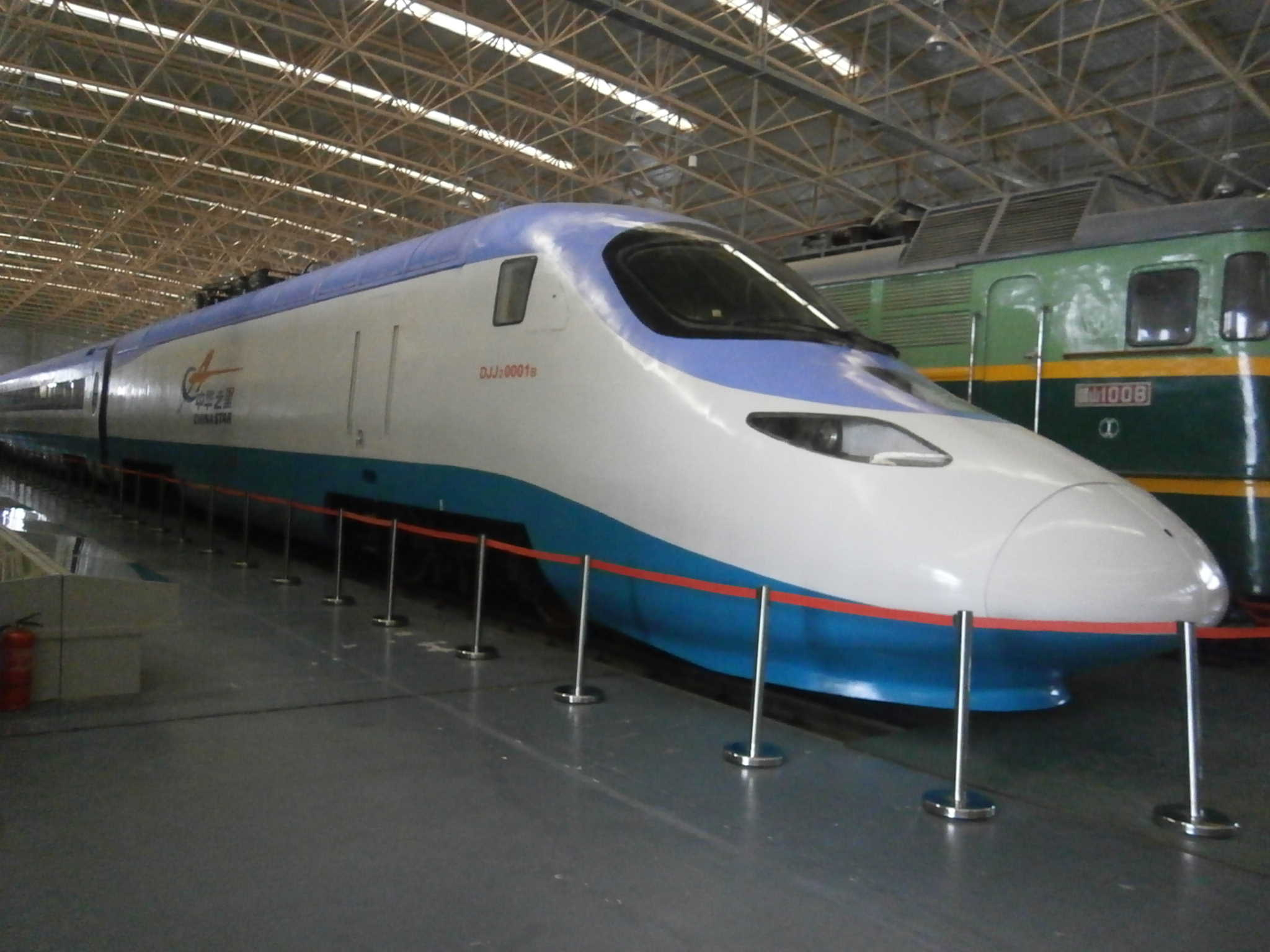 中国鉄道博物館東郊館で展示されている中国国鉄「中華之星」の先頭車両。2013年4月撮影